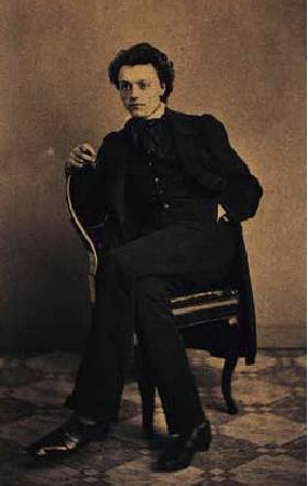 Photo